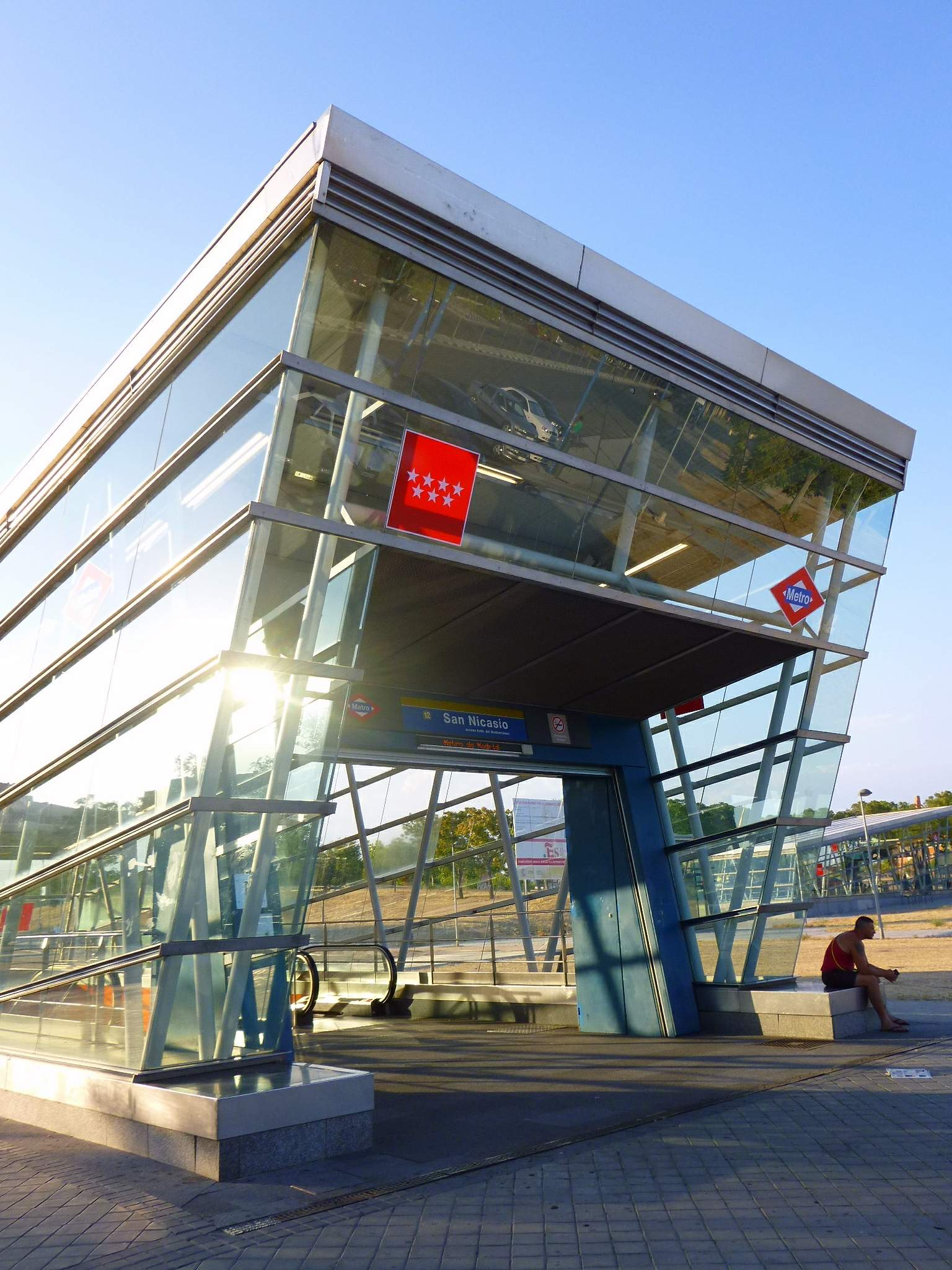 Estación de Metro Madrid San Nicasio, en Leganés